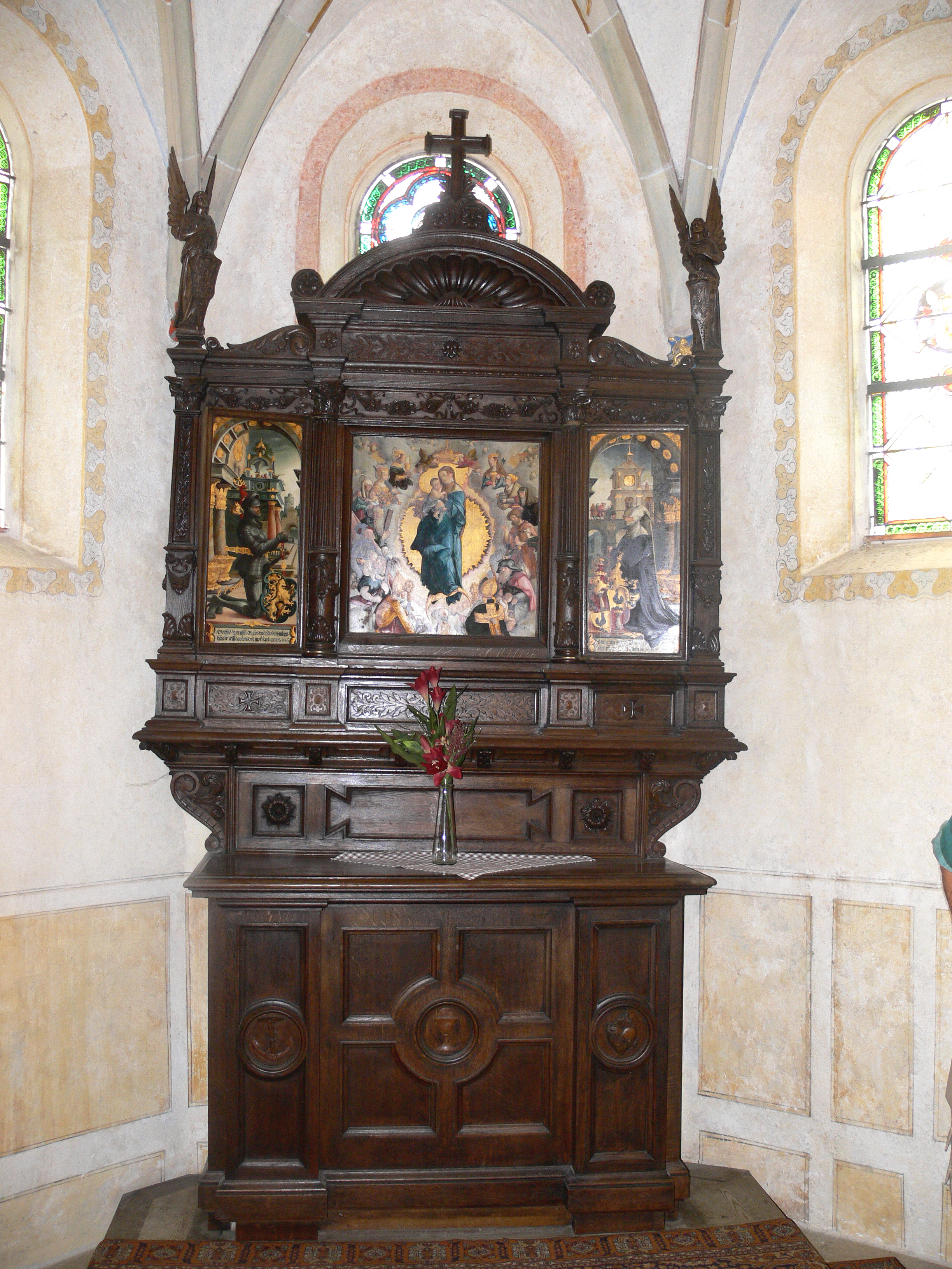 Burg Wildenstein bei Leibertingen Burgkapelle: Wildensteiner Altar (mit Kopie der Gemälde des Meisters von Meßkirch) Master of Messkirch (1500–1543) DescriptionGerman painterDate of birth/deathcirca 1500circa 1543Work locationMesskirchAuthority control : Q568760 VIAF: 4843738 ISNI: 0000 0000 9586 1583 ULAN: 500124279 LCCN: nr98024038 GND: 11936929X WorldCat